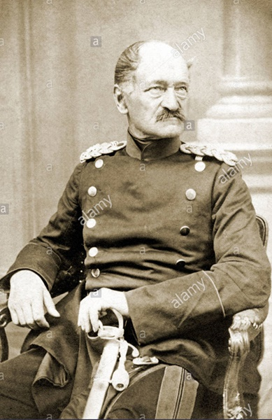 Bay. General Karl von Horn (1818-1896)